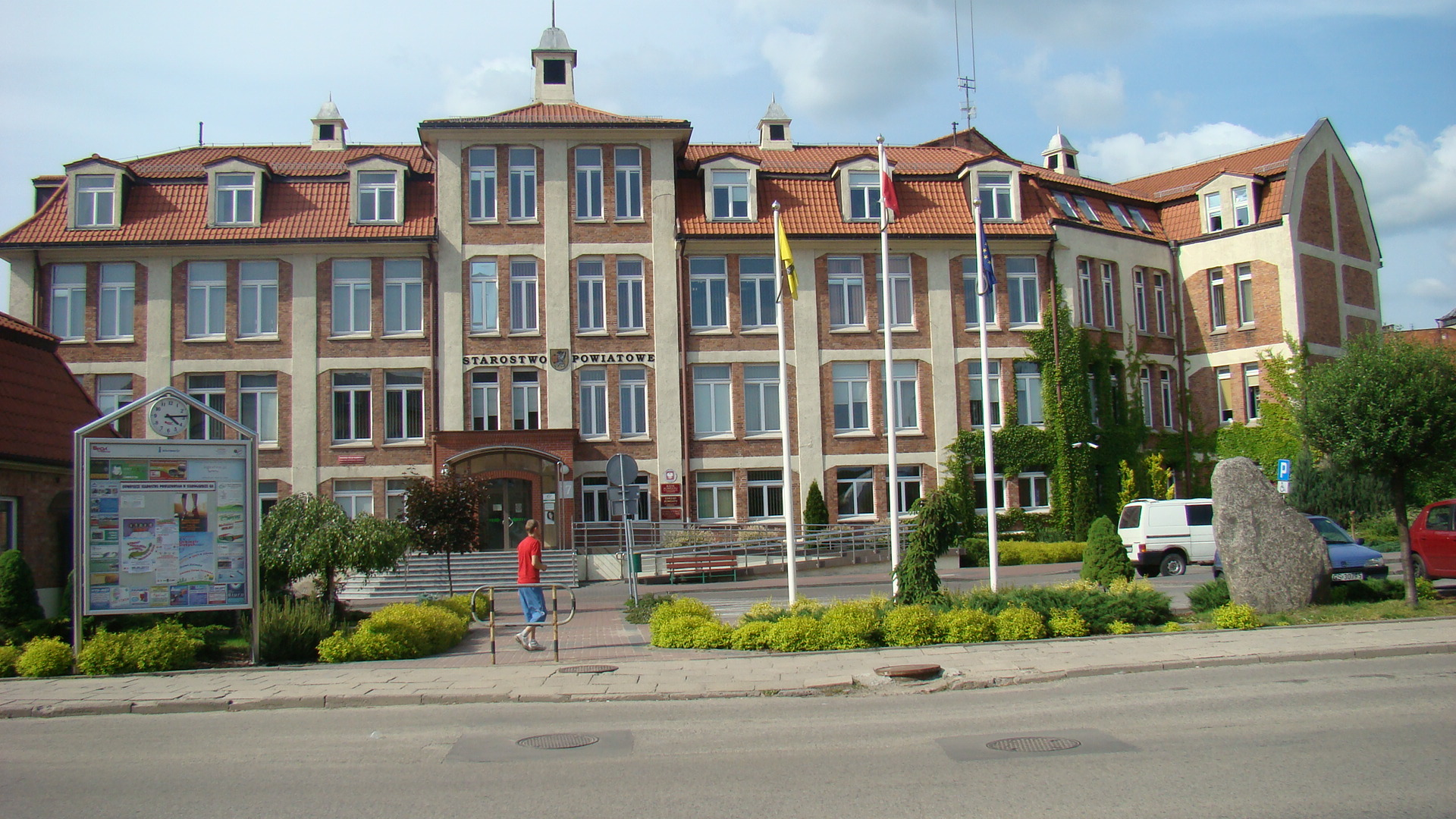 Budynek Starostwa Powiatowego znajdujący się przy ul. Tadeusza Kościuszki 17.